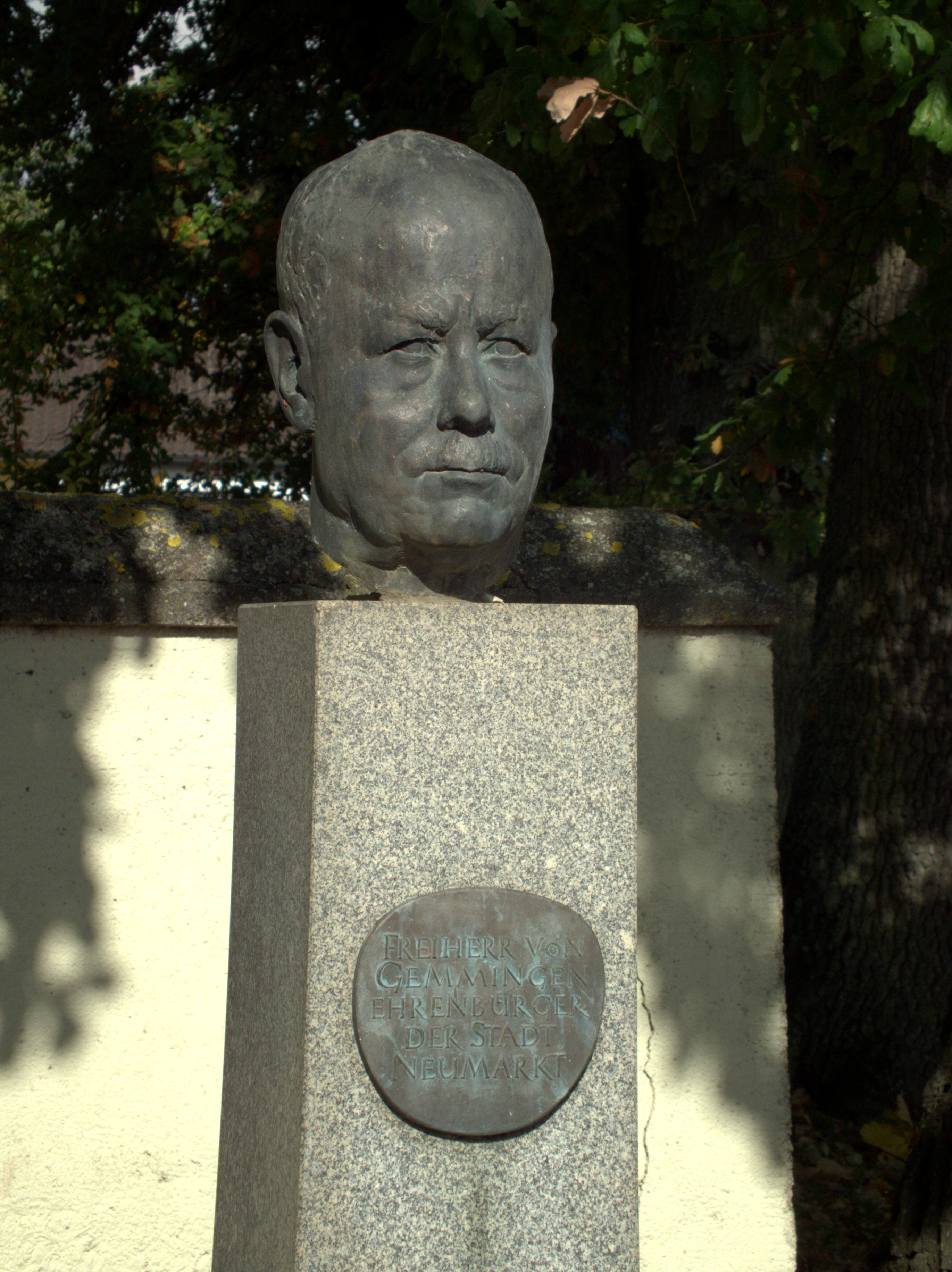 Büste des Neumarkter Ehrenbürgers Ludwig Freiherr von Gemmingen Hornberg vor dem ehemaligen Woffenbacher Schloss